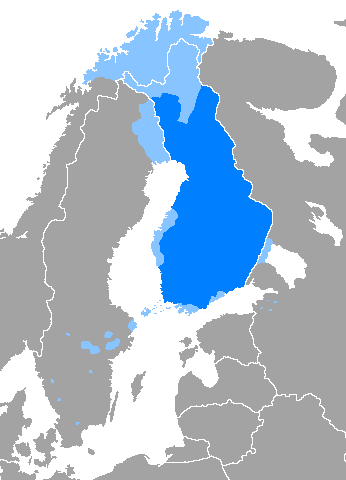 Donde es mayoritario Donde es minoritario